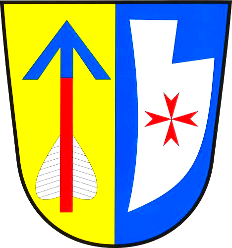 znak obce Drachkov